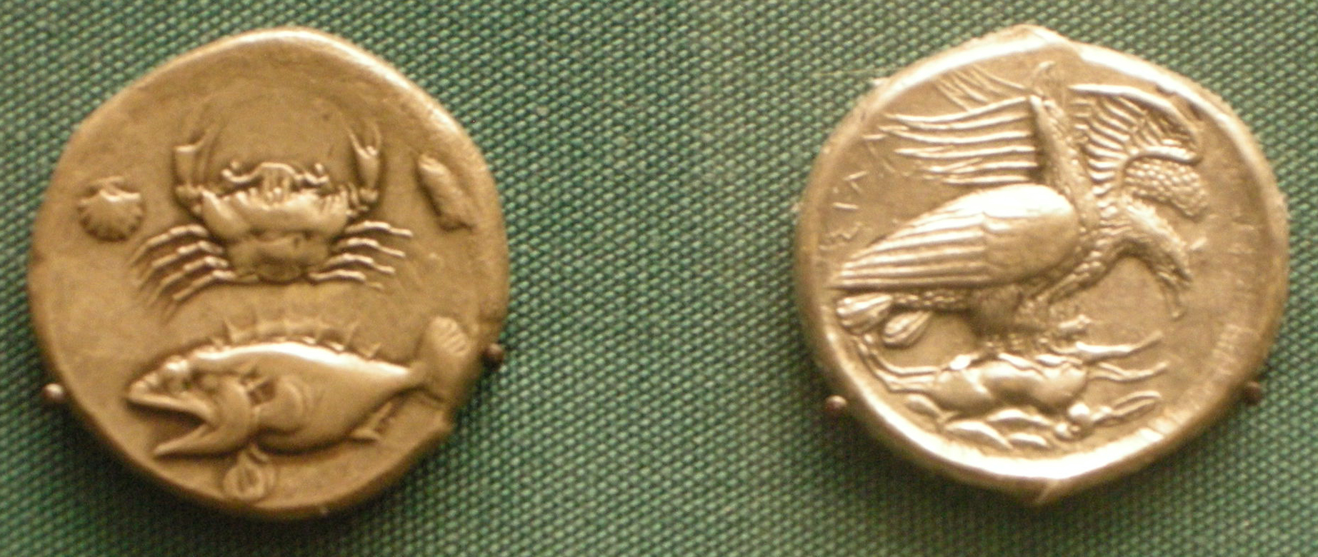 Monete d'argento di acragas, 420-410 ac. circa